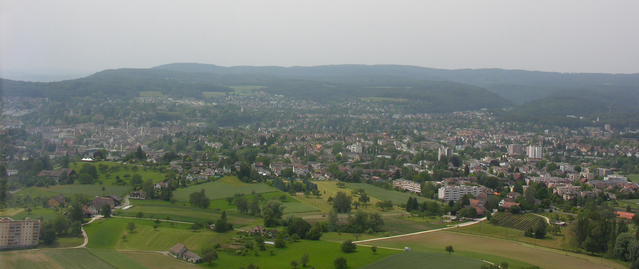 Switzerland, Canton of Schaffhausen, Schaffhausen, Buchthalen